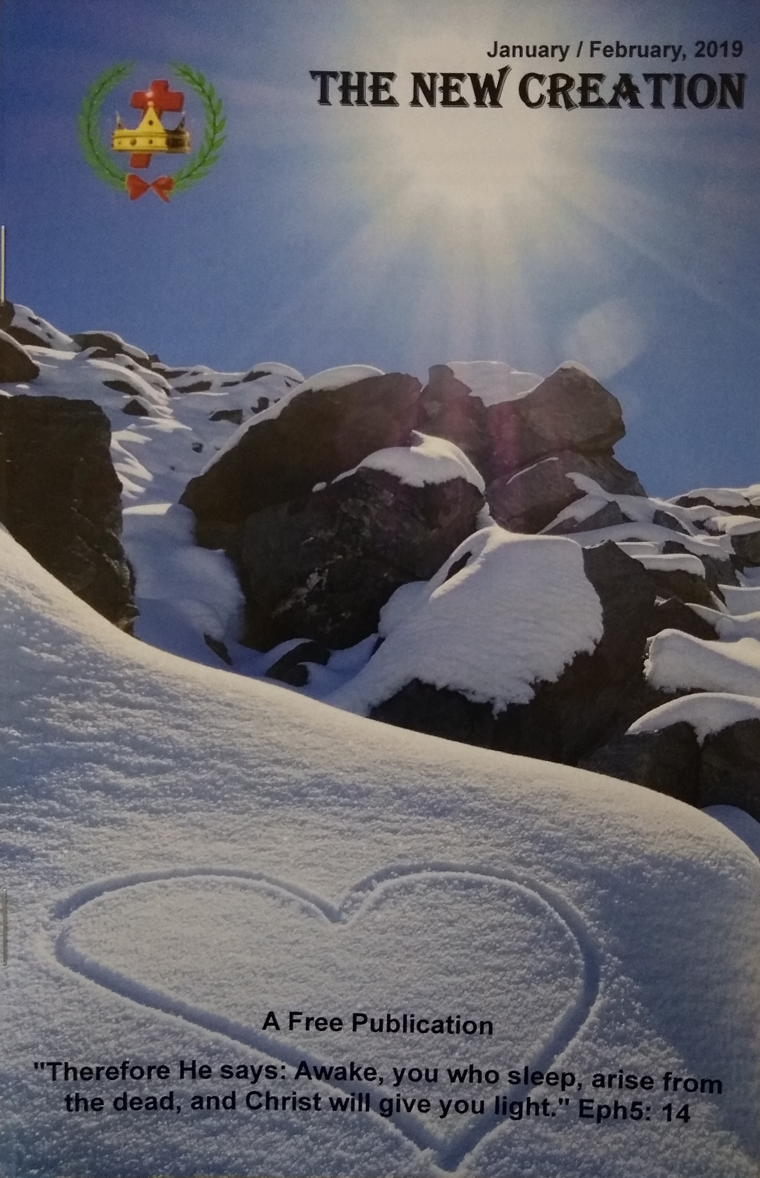 Die Titelseite der Zeitschrift von der Gemeinschaft der Freien Bibelforscher. Erscheint seit 1940 und hat kein Copyrigth.